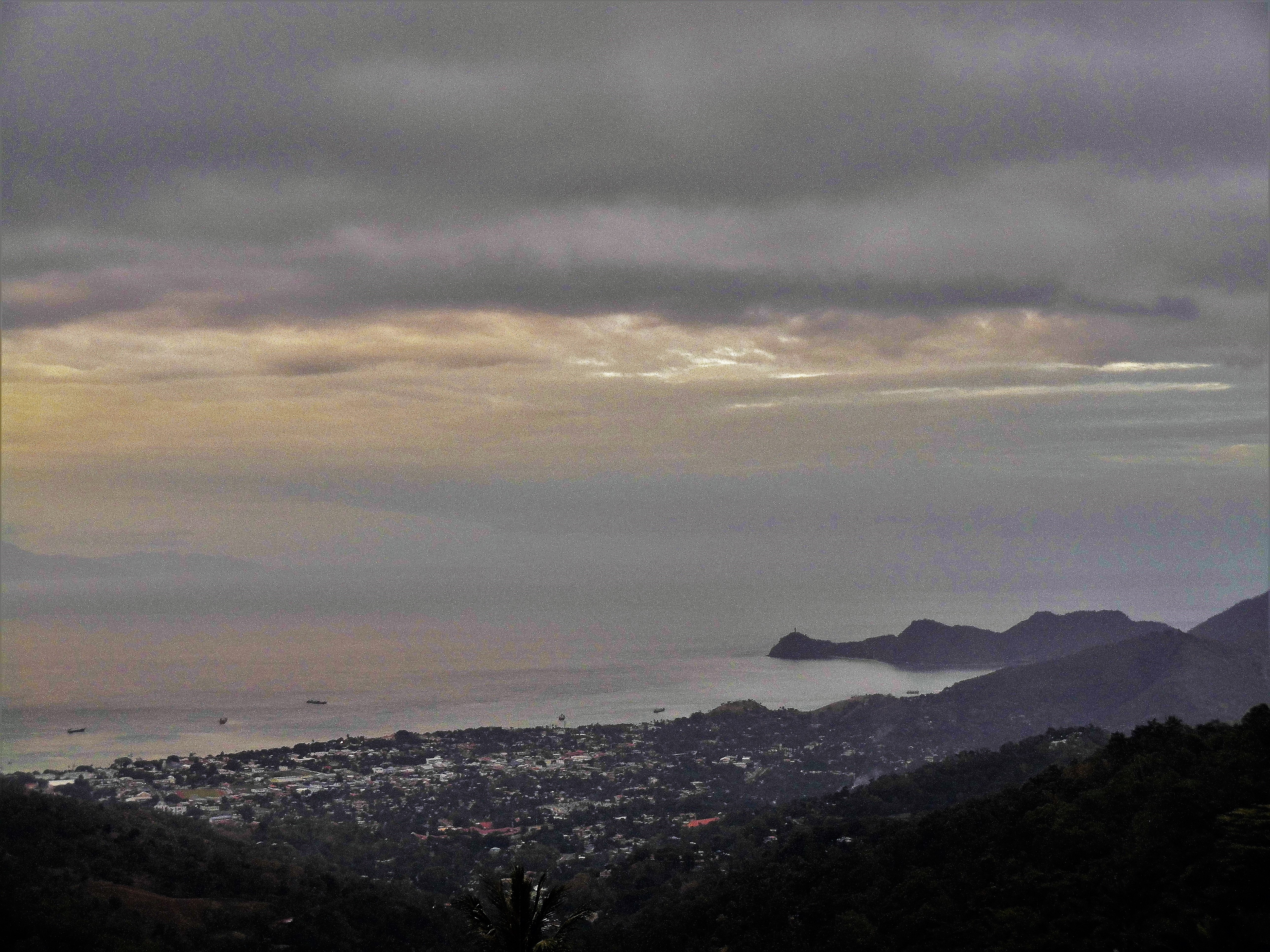 Bucht von Dili